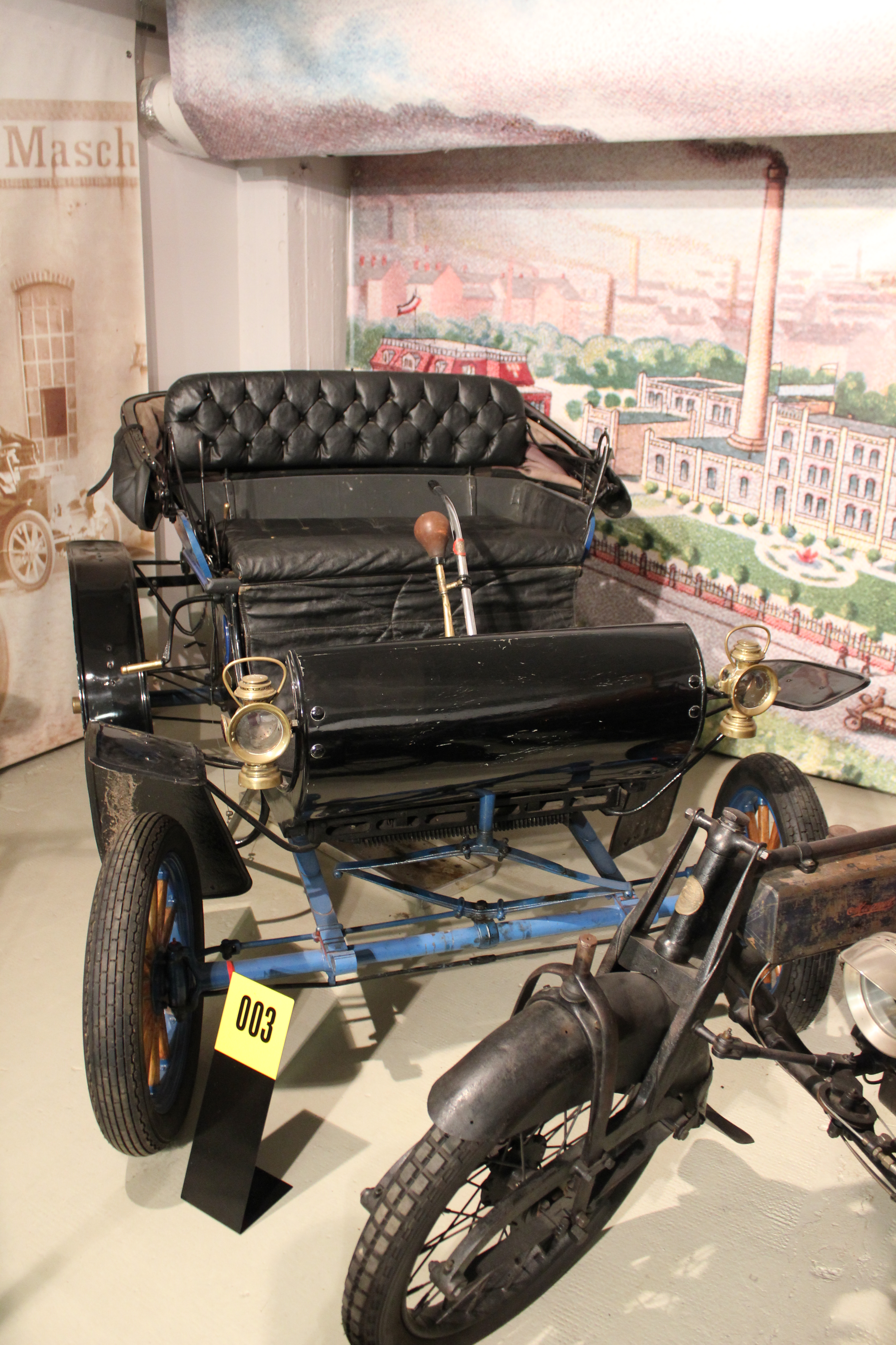 Polymobil von 1903. Exponat des Museums für sächsische Fahrzeuge. Das Bild entstand mit der Einwilligung des Museums.